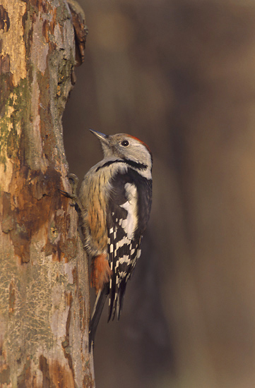 Dendrocopos medius